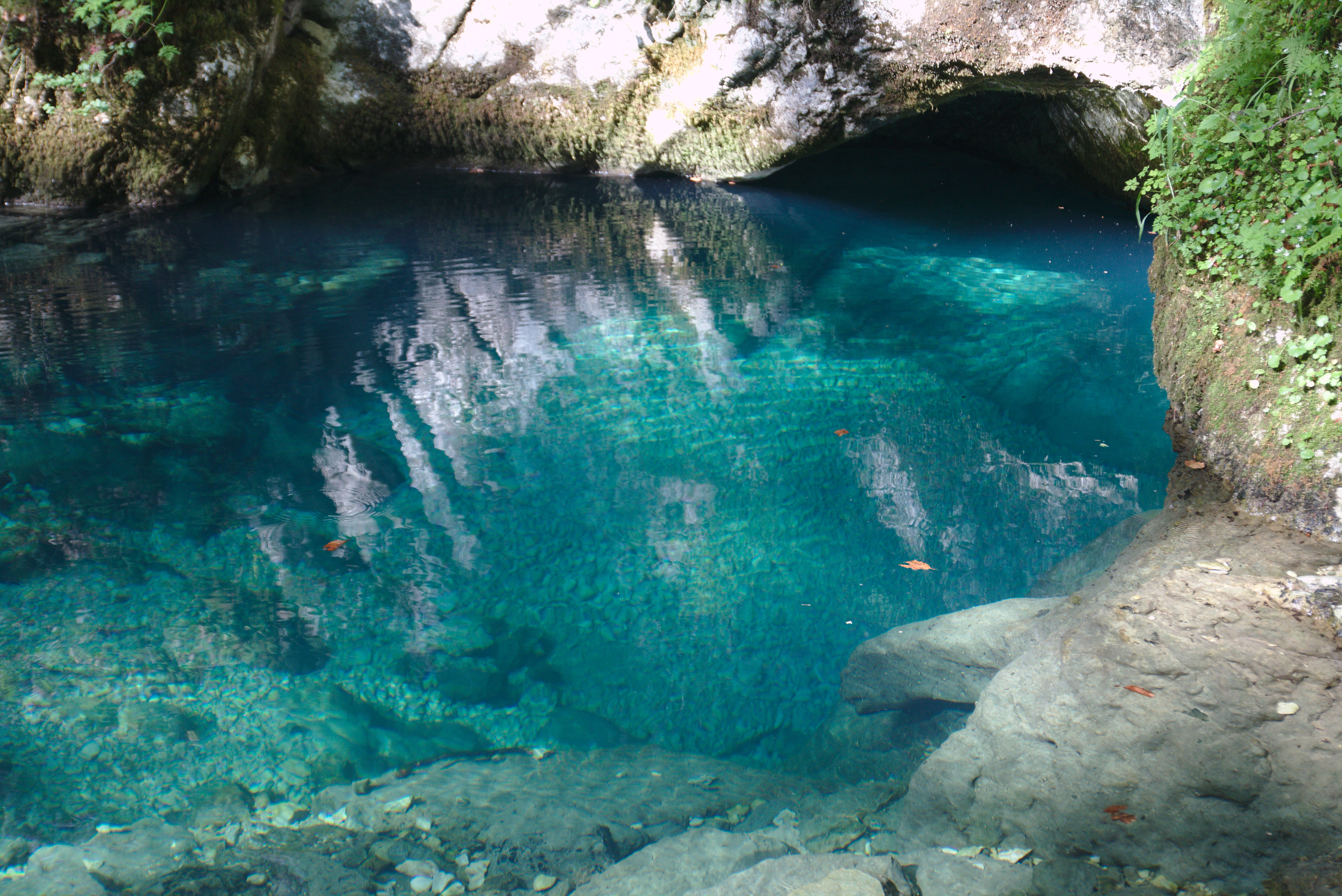 La Source Bleue à Malbuisson dans le Massif du Jura.